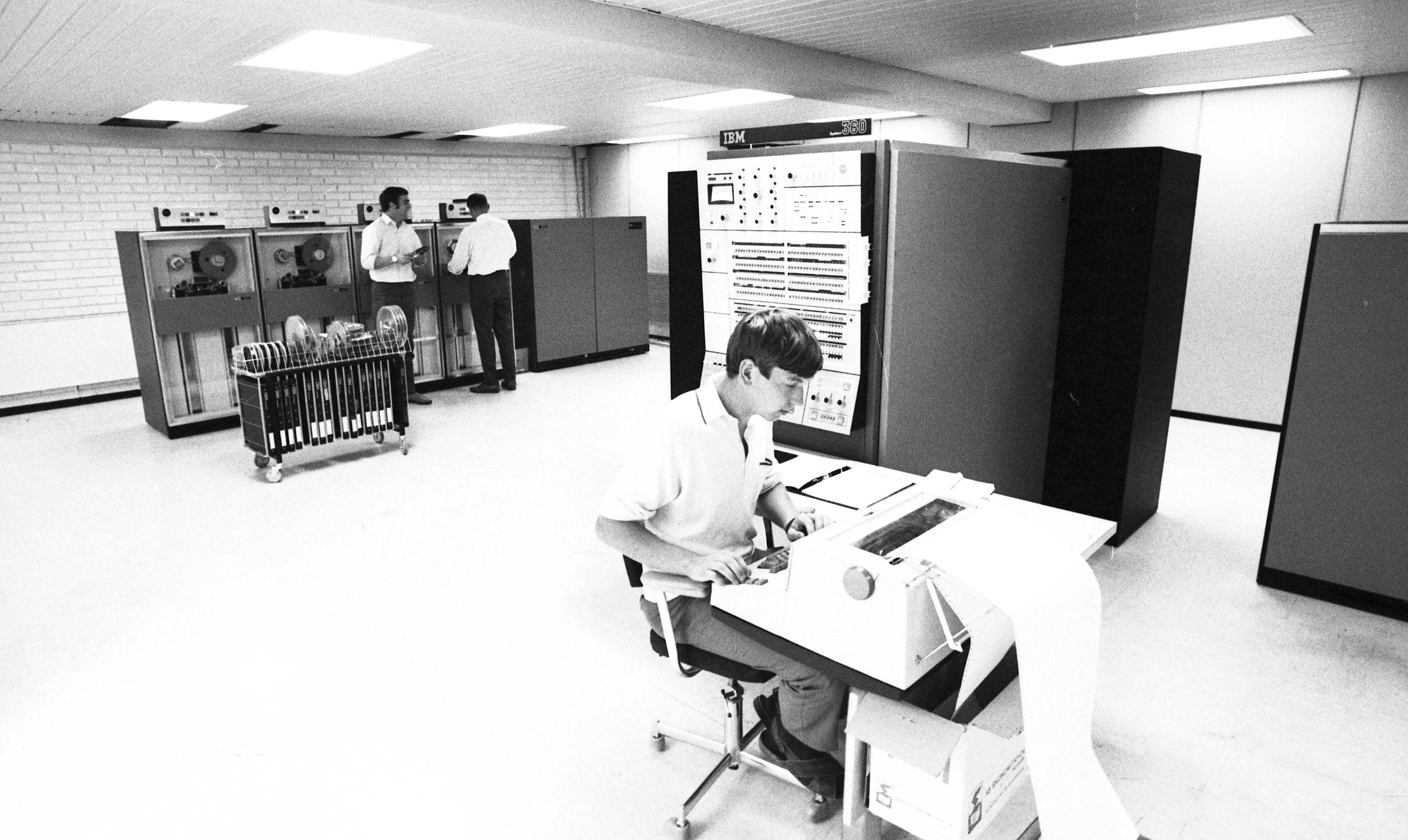 Bildet er hentet fra Arkivverket. Computer - EDB anlegg hos Skattedirektøren. I 1962 investerte IBM ufattelige 5 milliarder dollar for å utvikle en ny type datamaskin som skulle ta luven fra alle andre maskiner på markedet. Den 7. April 1964 ble ”IBM 360” presentert. Den hadde et hovedminne (RAM) på 8 til 64 Kb, og kunne utføre 34 500 ”instruksjoner” per sekund. "IBM 360" revolusjonerte dataindustrien og ble en stor salgssuksess for selskapet. "360" var den første maskinen som hadde et enhetlig system av maskin- og programvare som var tilpasningsdyktig til flere formål. "360" kunne dessuten oppgraderes uten at maskinvaren måtte gjenoppbygges. Her er maskinen avfotografert hos Skattedirektøren i 1969. Arkivinstitusjon : Riksarkivet Arkivnavn : Billedbladet NÅ Sted : NORGE, Oslo, 00 Ukjent, Emneord: Teknologi, Data, Kontor, Arbeid Avbildet